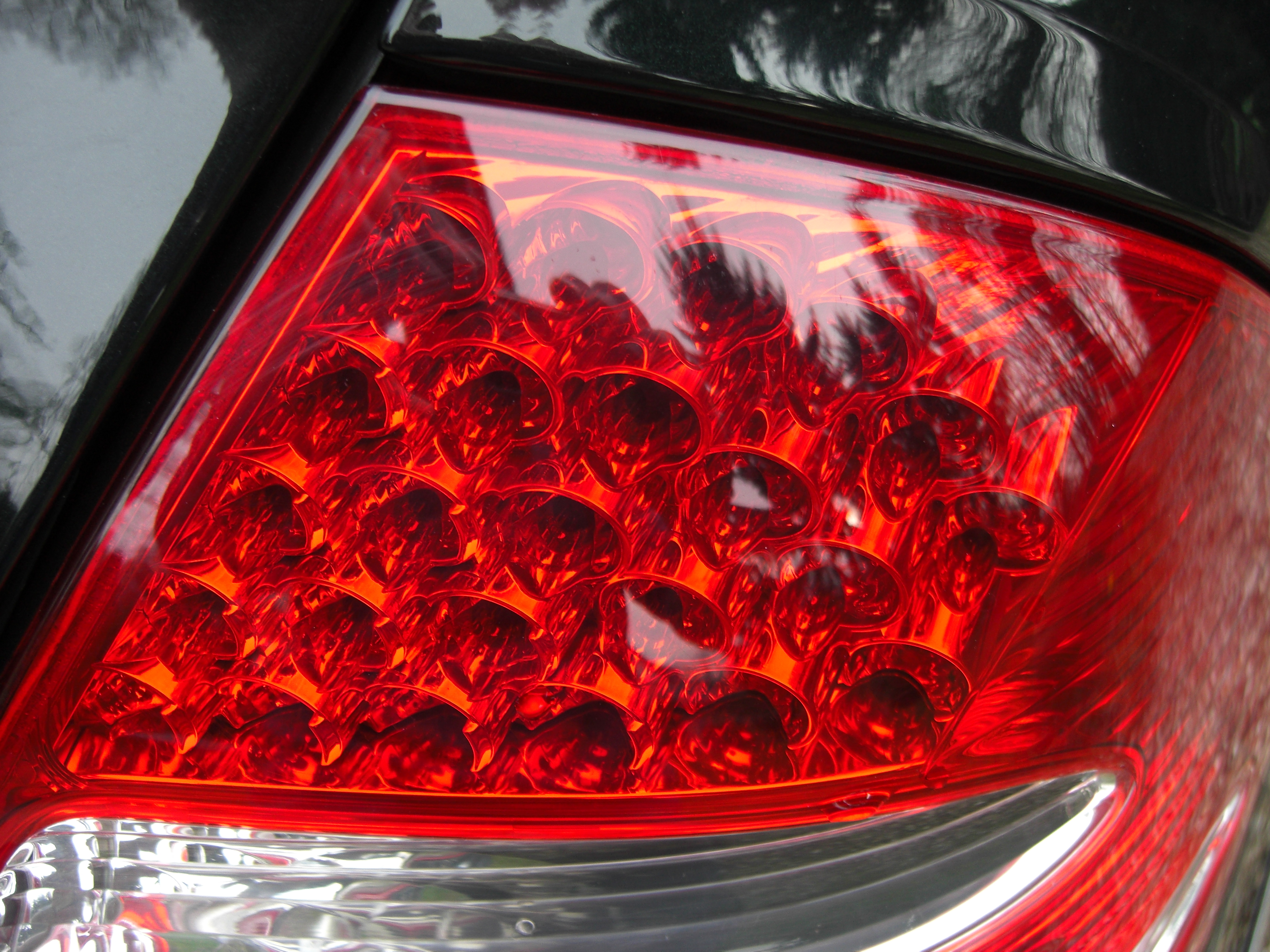 Mercedes E240 Avantgarde